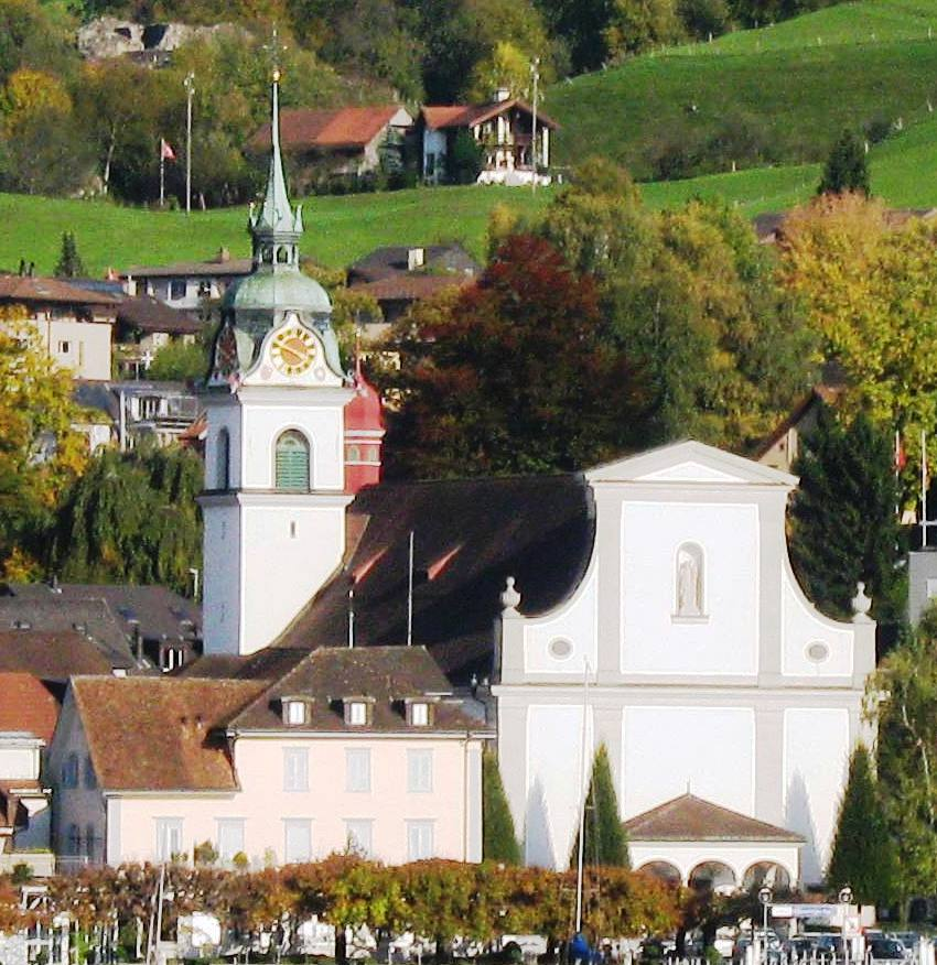 Parochiekerk van St. Petrus en Paulus.